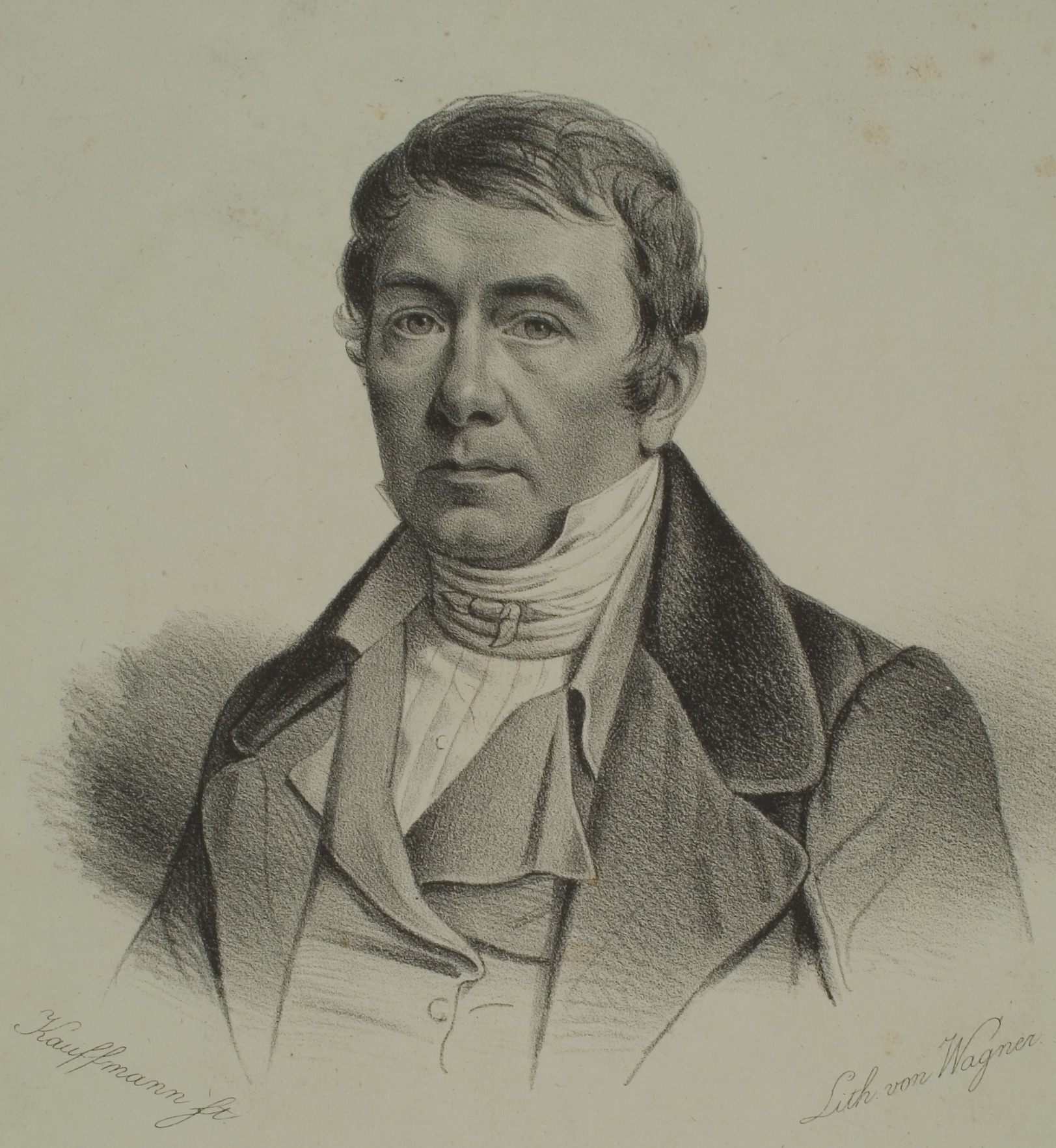 Johann Metzger (1789–1852), deutscher Hortikulturist, Großherzoglicher Garteninspektor in Karlsruhe